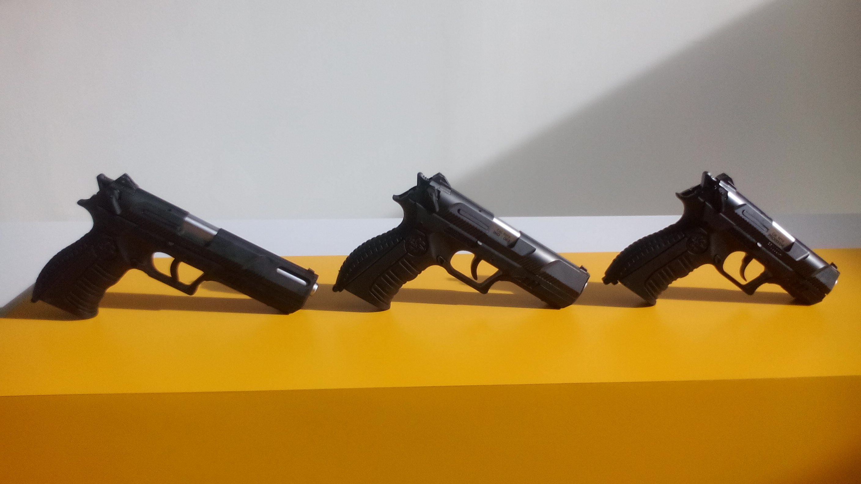 Pistolas Córdova en sus tres versiones: Táctica, Estándar y Compacta